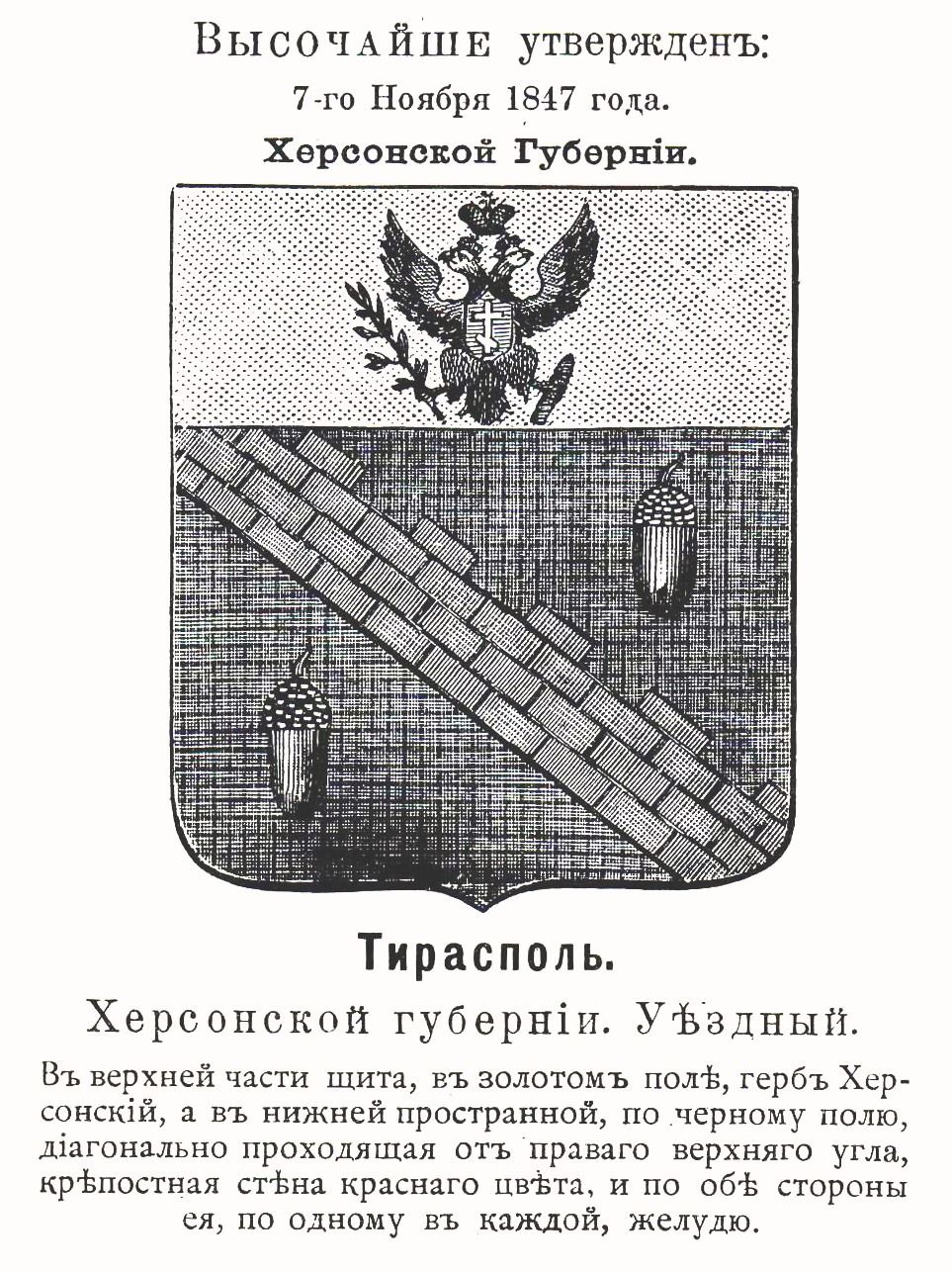 Official Russian Empire coat of arm Tiraspol. Герб Российской Империи уездного города Тирасполь Херсонской губернии с официальным описанием в Гербовнике Винклера.